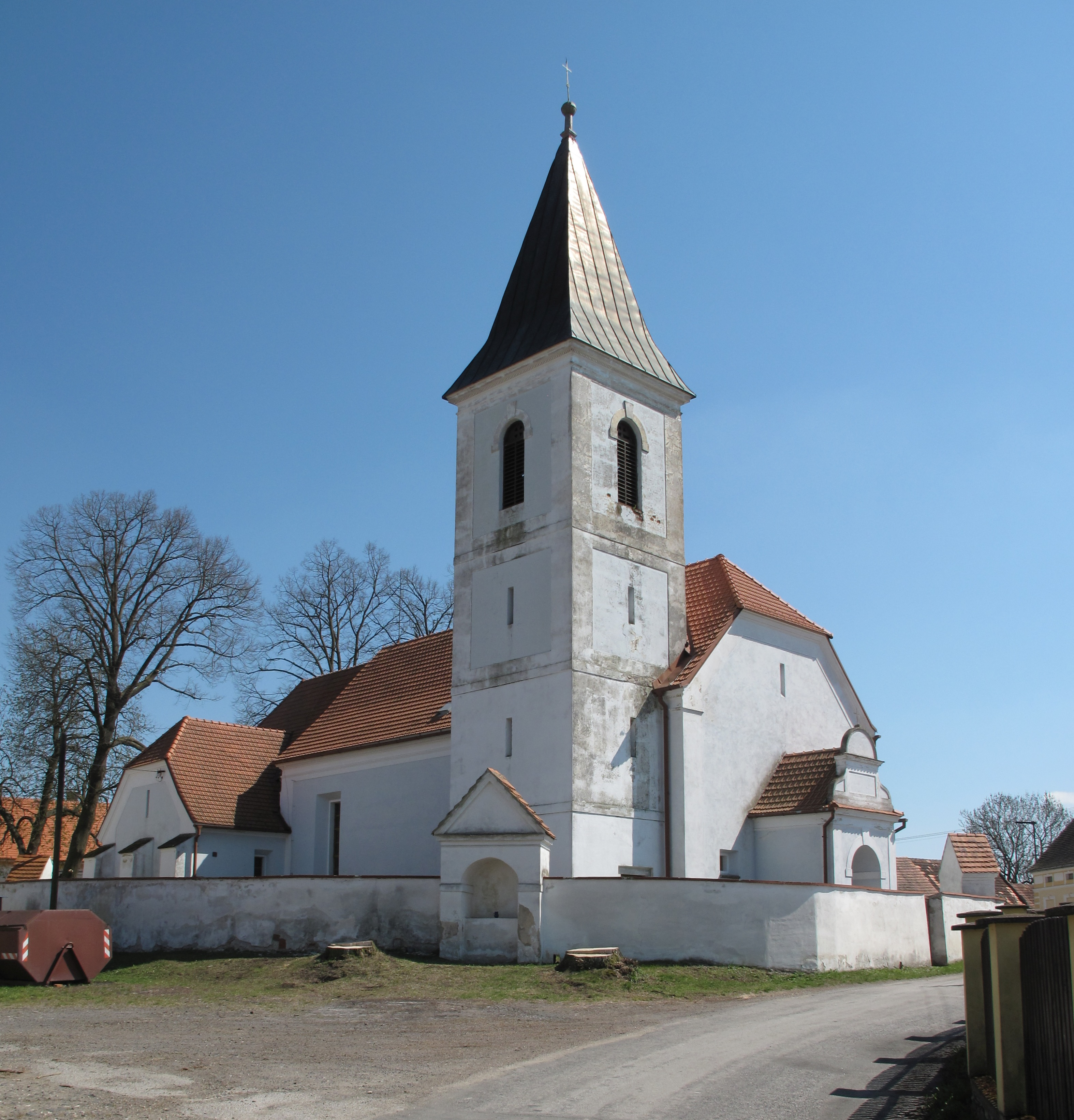 Kostel v Modré Hůrce. Okres České Budějovice, Česká republika.